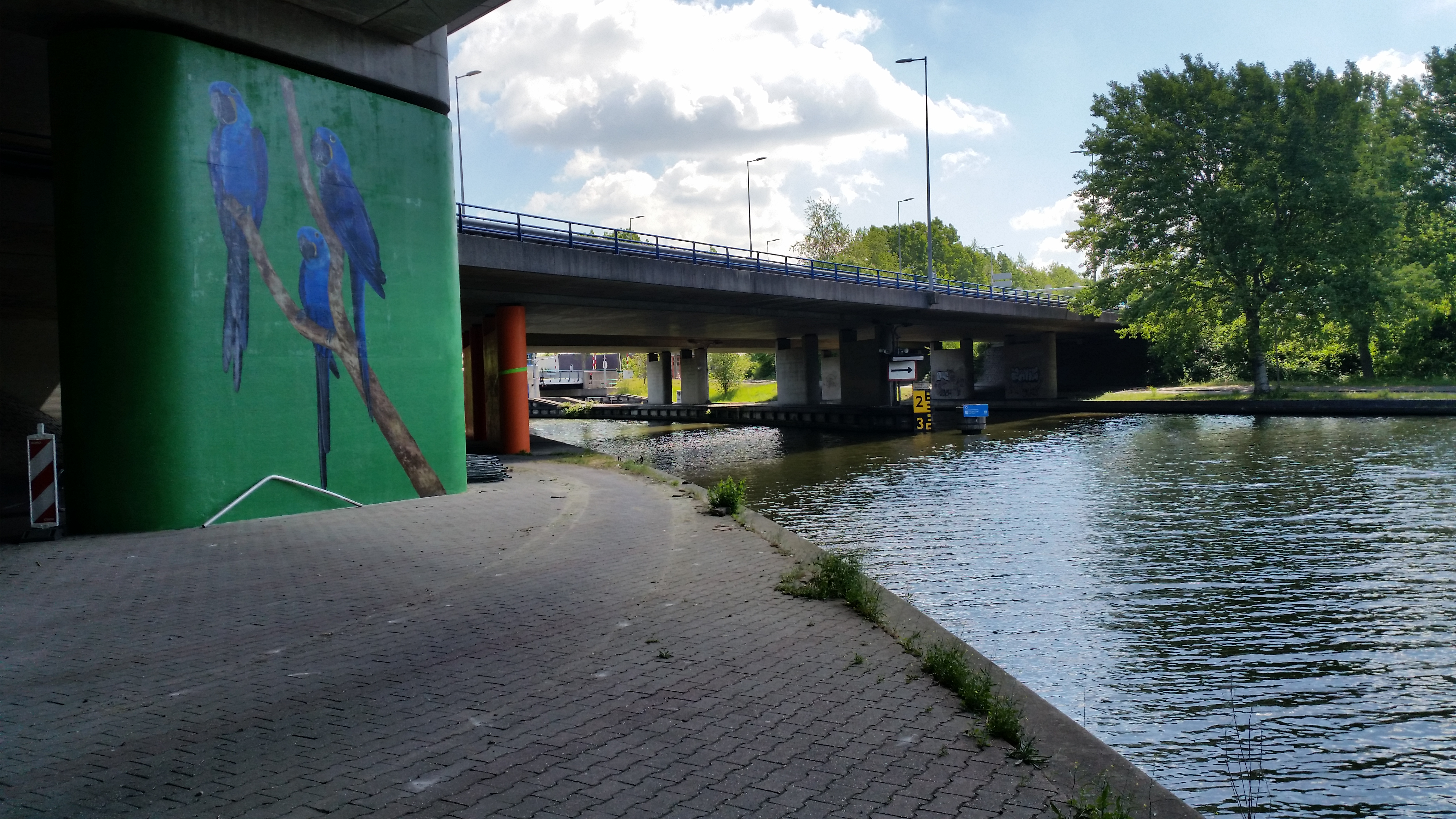 Impressie van Brug 1269 over de Weespertrekvaart in de Gooiseweg met beschilderingen